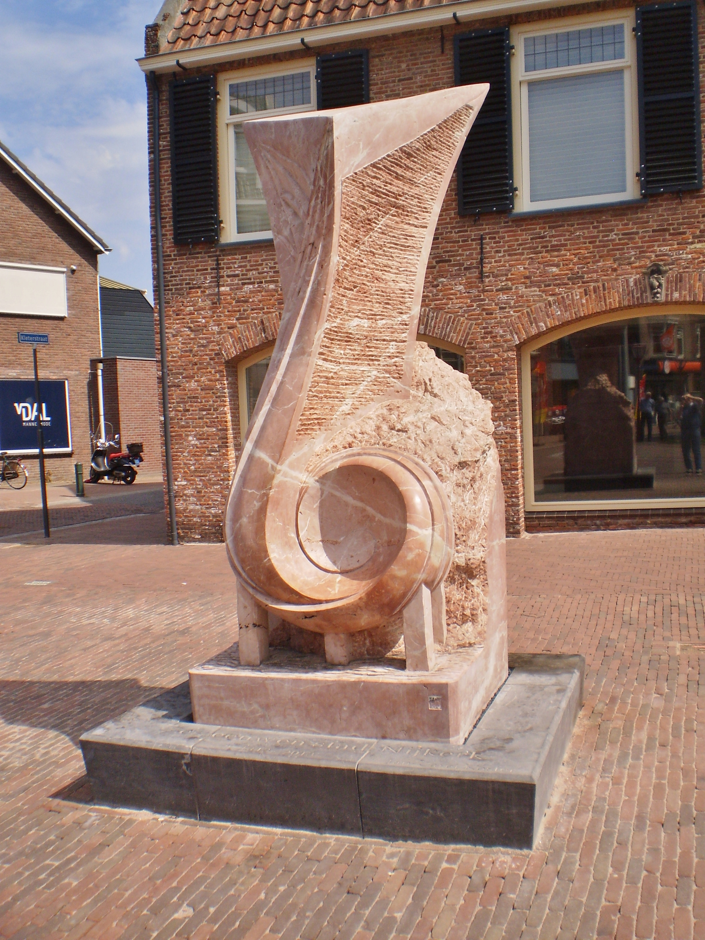 zes Eeuwen stad Nijkerk van kunstenaar Jan-Carel Koster op de plek waar de Frieswijkstraat, de Oosterstraat en Langestraat samenkomen